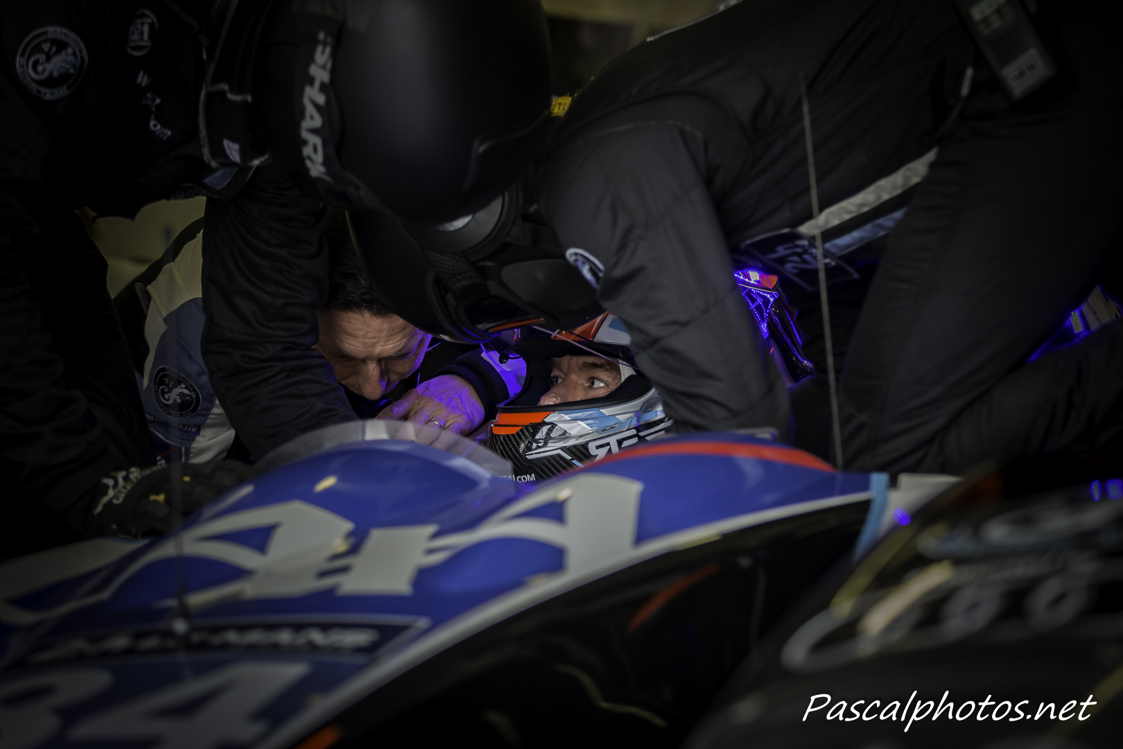 Frédéric Sausset lors de la journée test du 5 juin 2016